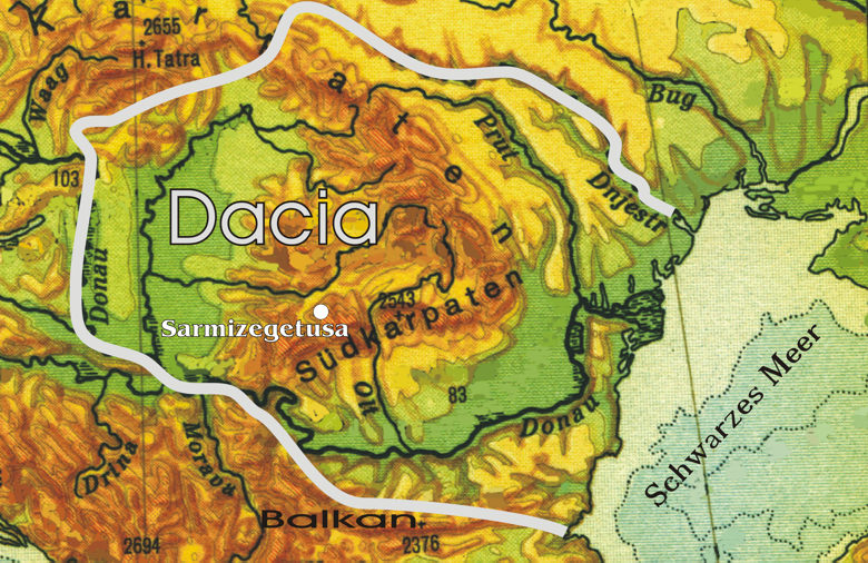 Karte Dacia 82.Chr. - selbst erstellt 10/2005 - GNU-FDL